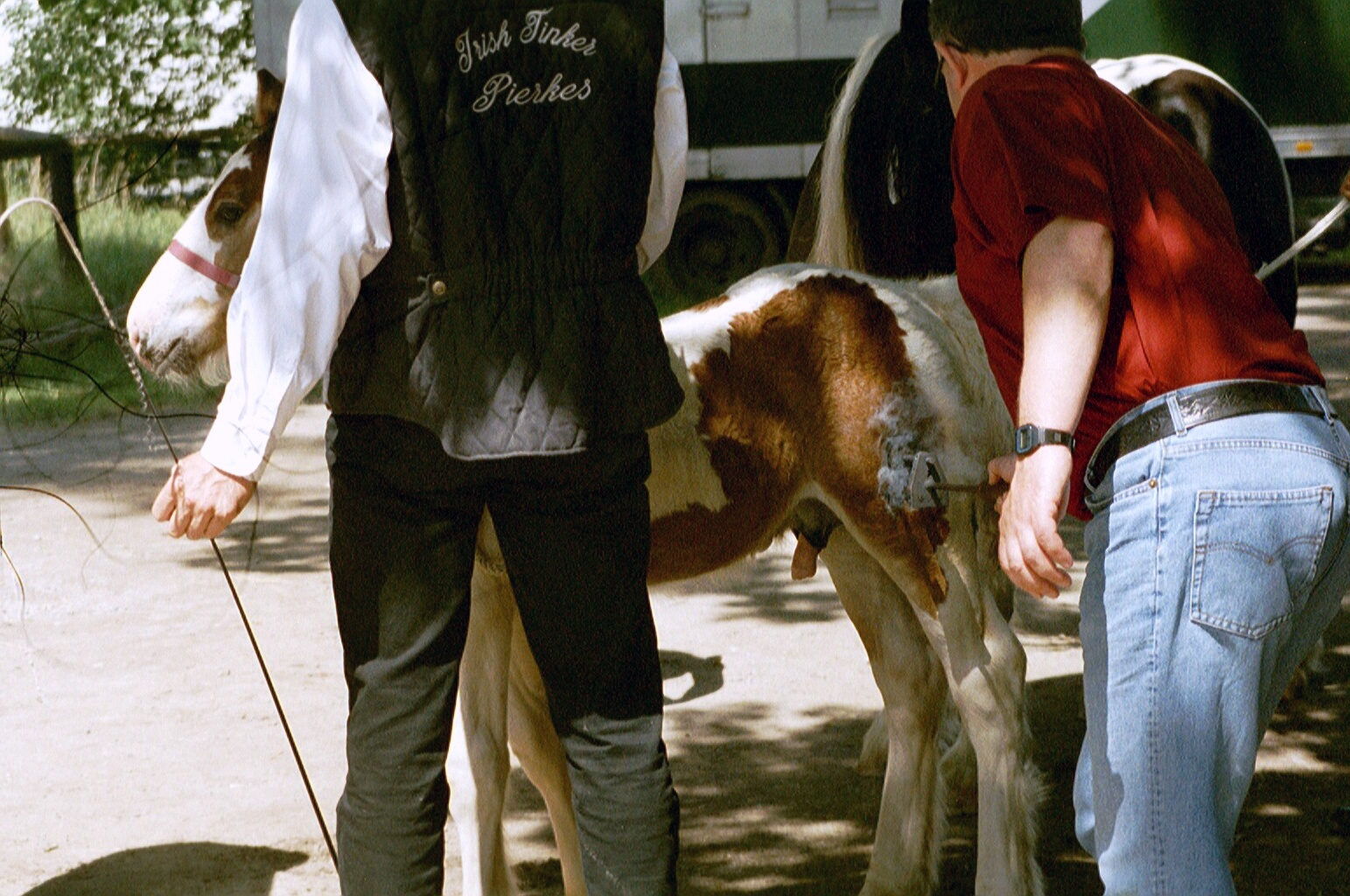 Horse branding